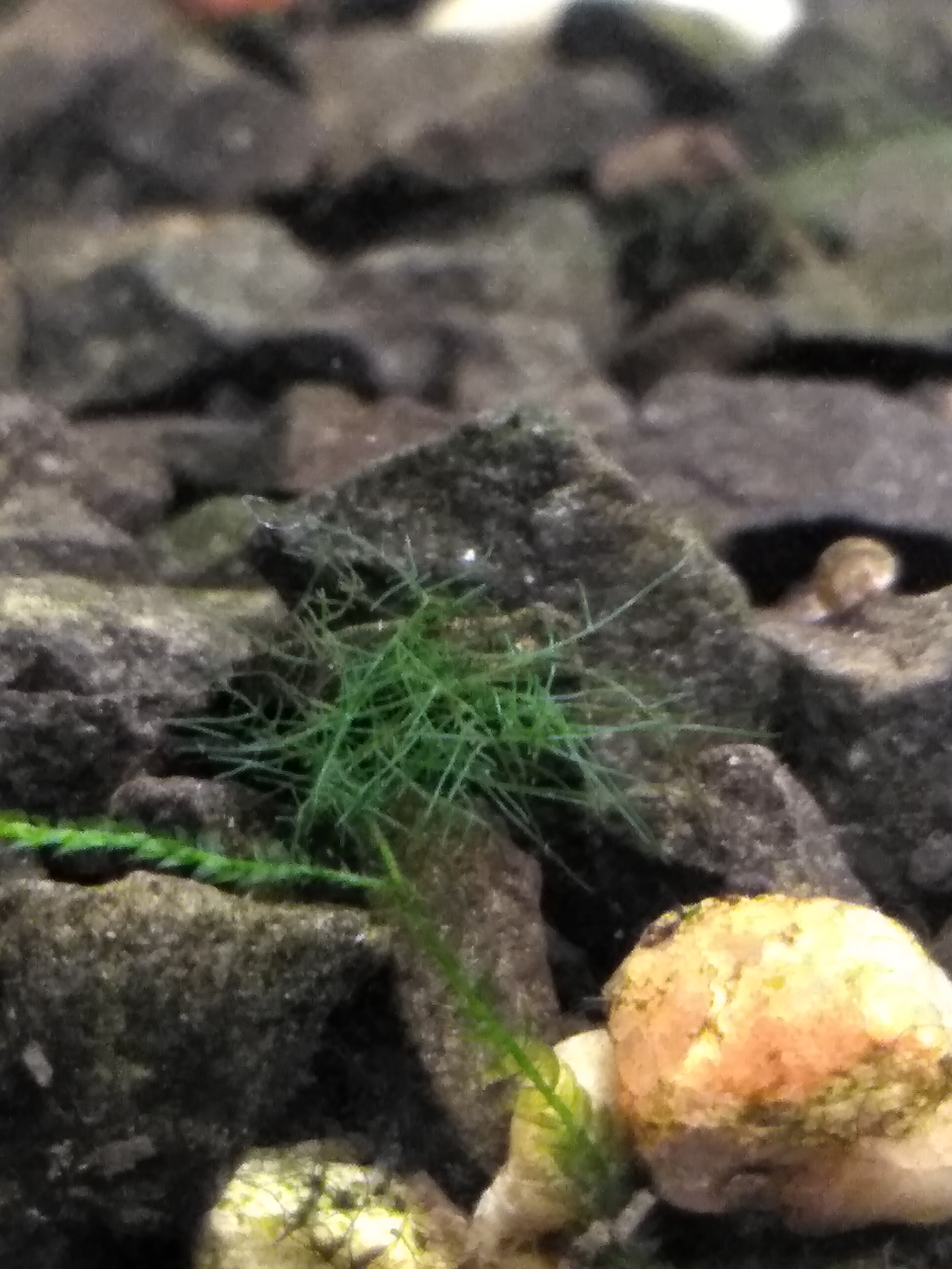 Водорость кладофора в акваріумних умовах самостійно розповсюджується з частинки відростку